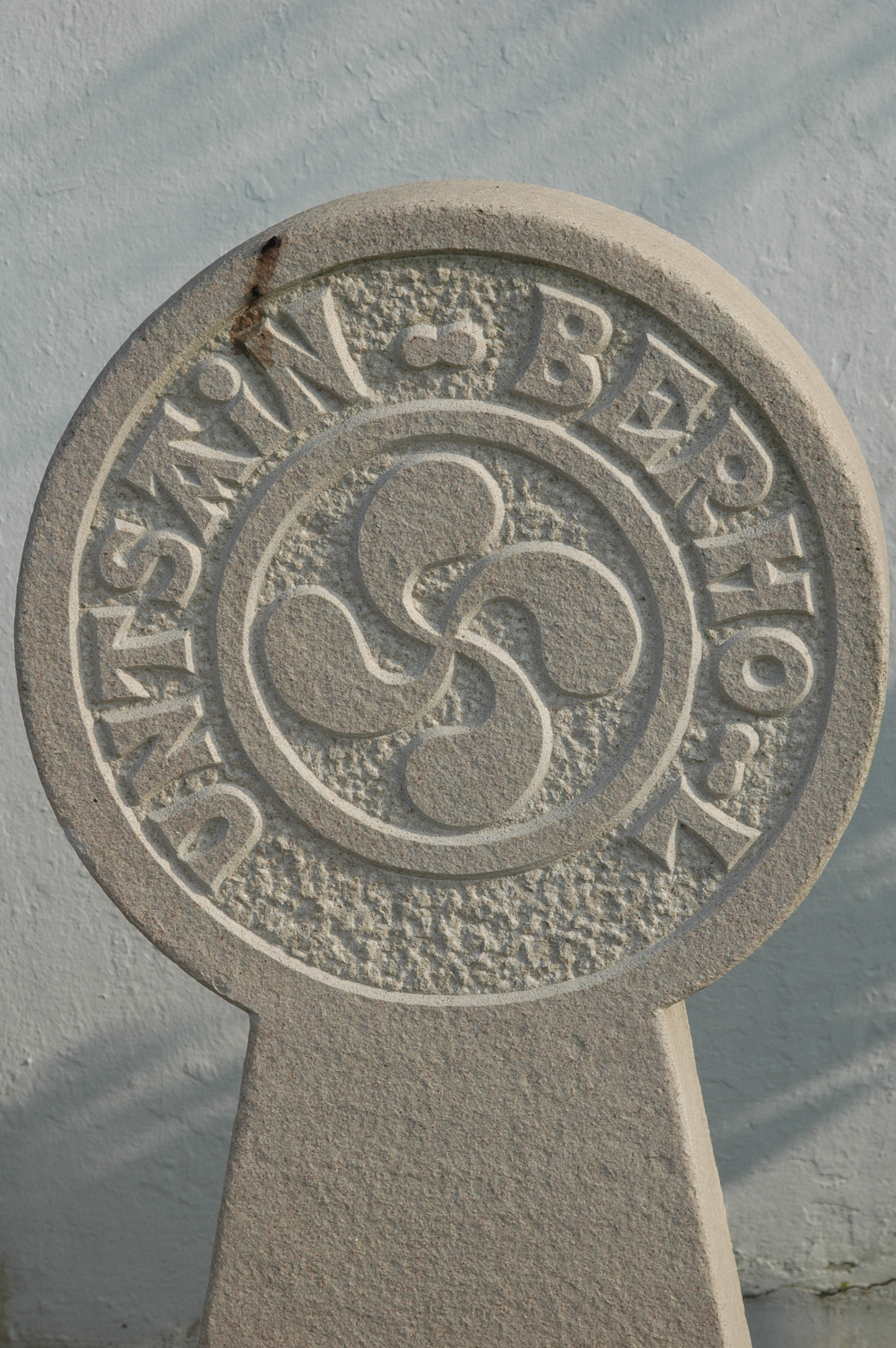 Ascain, stèle discoïdale. Photo prise le 23/07/06 par Harrieta171